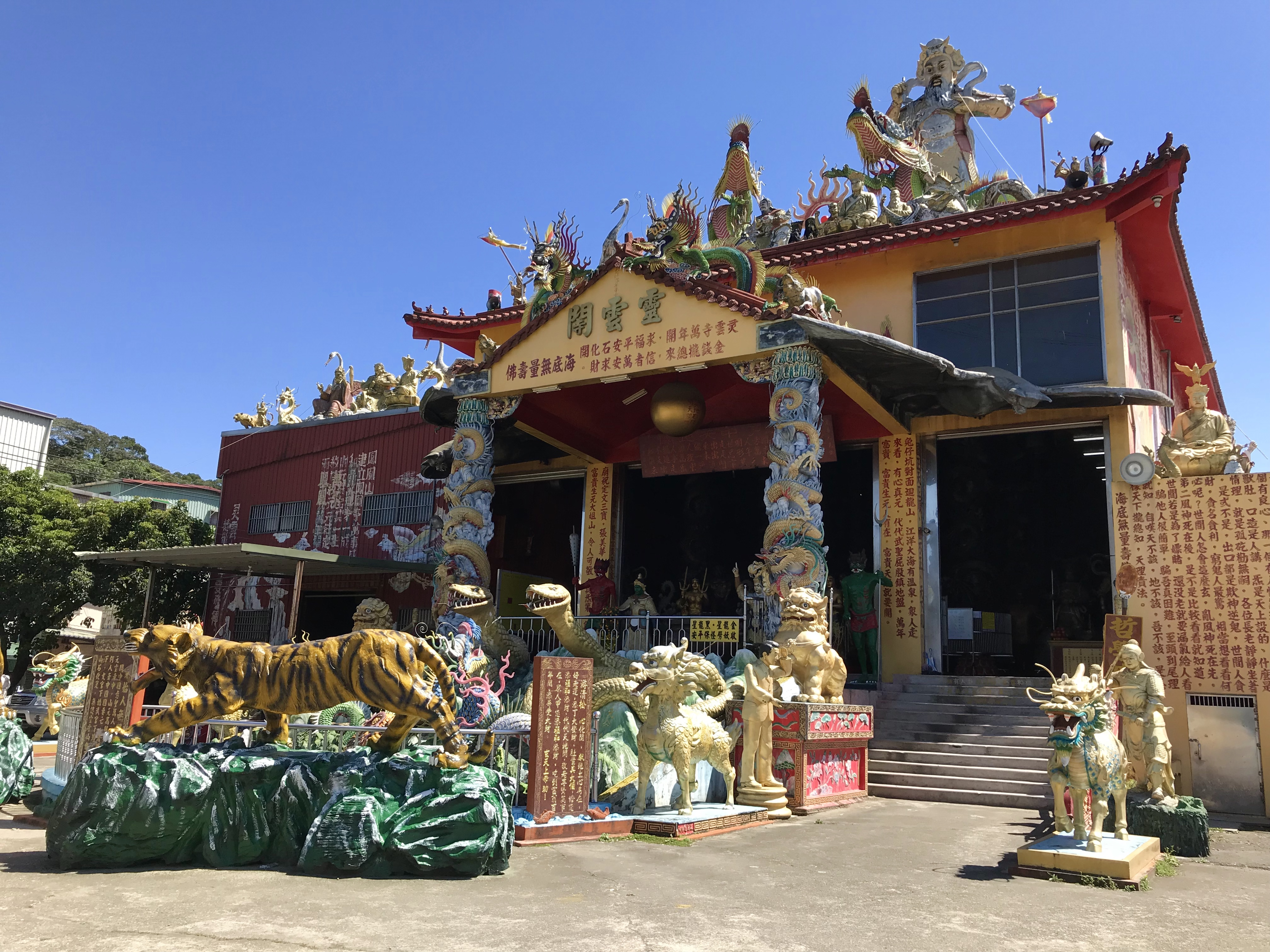 靈雲寺哲學廟斜照